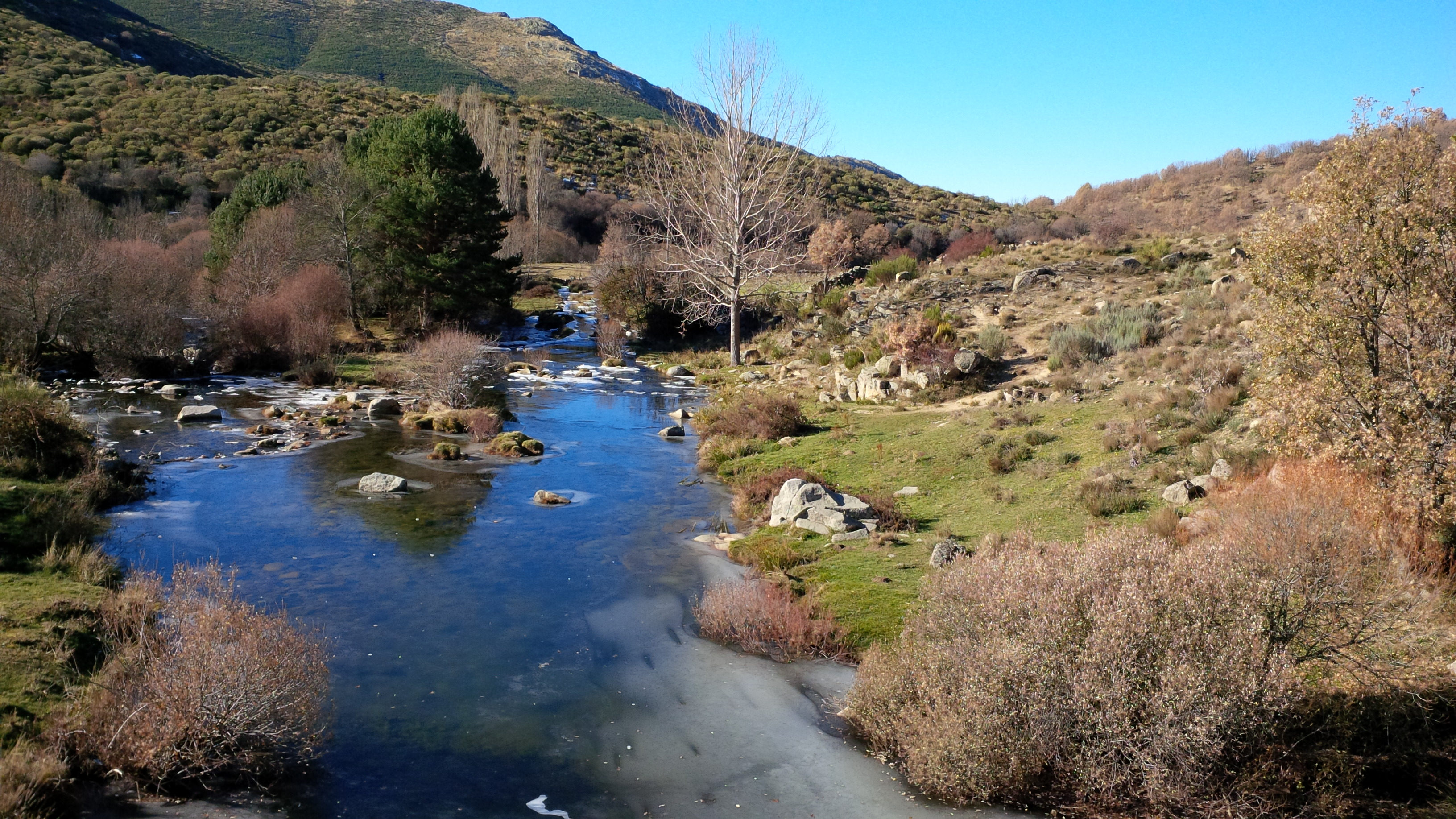 La Sierra de Gredos desde Navacepeda de Tormes. This is a photography of a Special Area of Conservation in Spain with the ID: ES4110002. Natura2000 entry, EEA entry